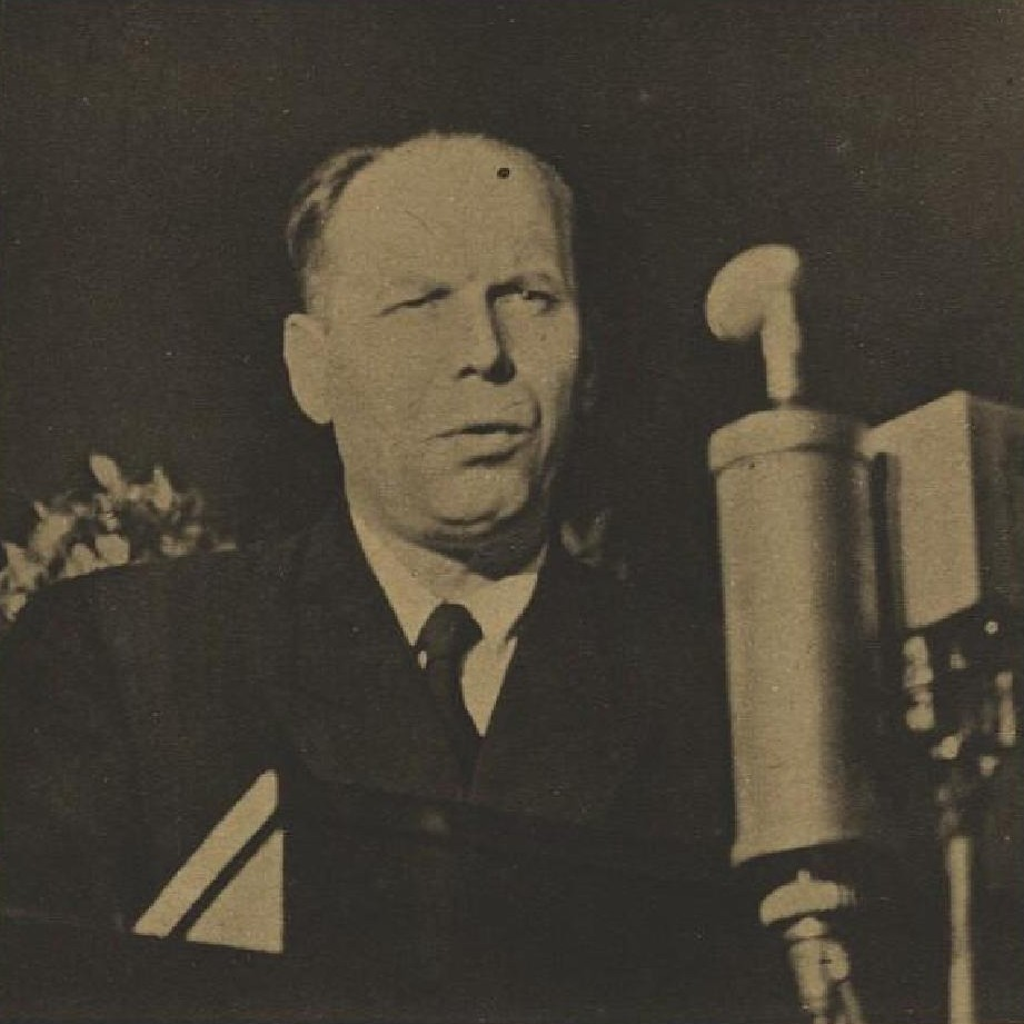 Ladislav Štoll (1902-1981), český marxistický literární kritik a politik